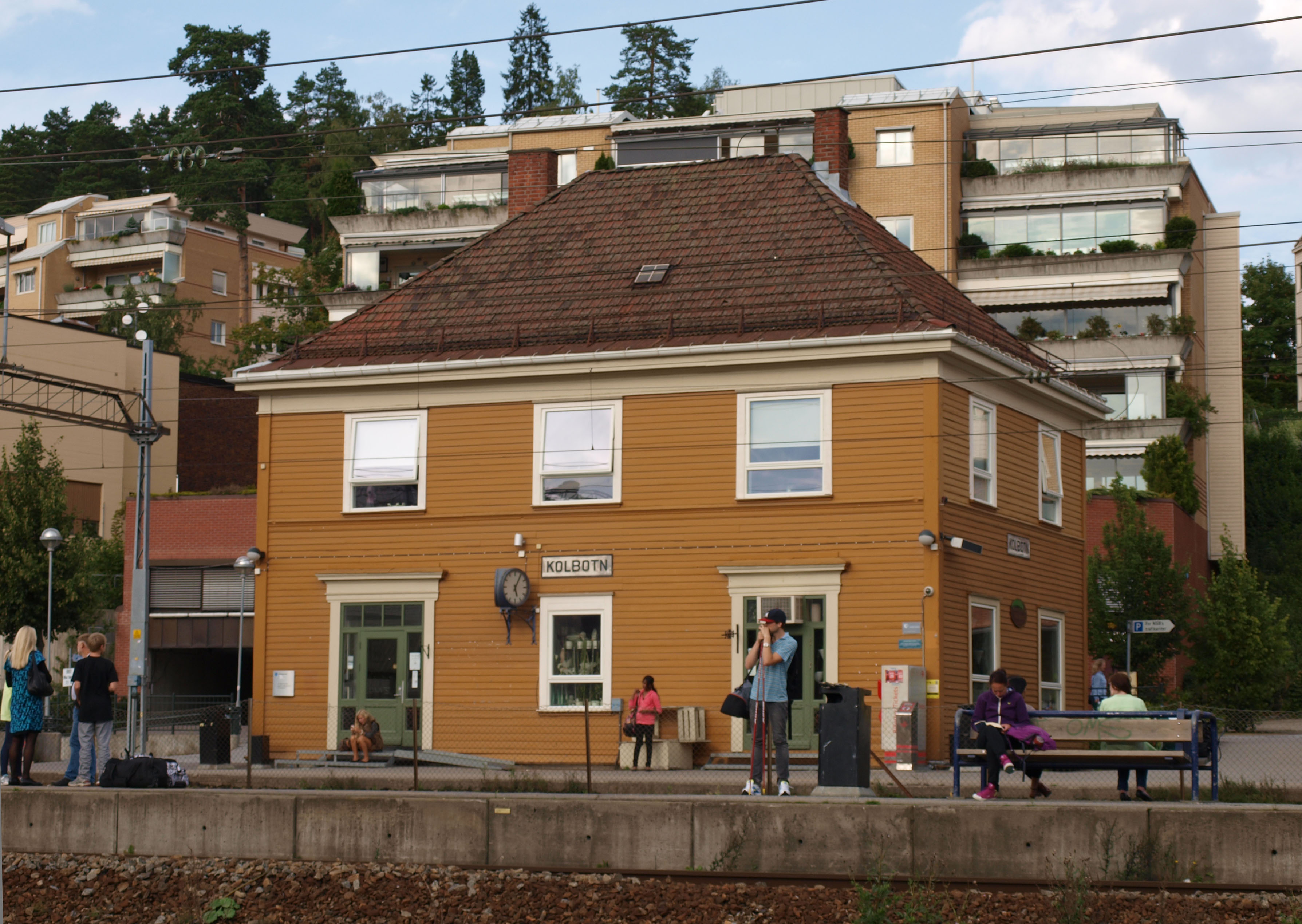 Kolbotn stasjon i Oppegård